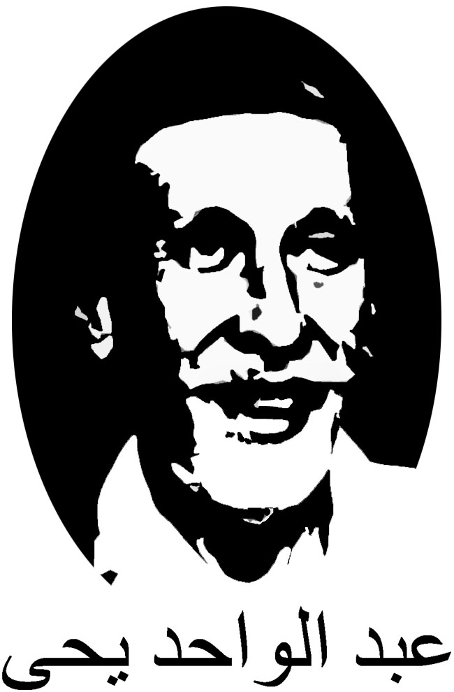 René Guénon (Blois, 15 de Novembro de 1886 — Cairo, 7 de Janeiro de 1951) foi um metafísico e crítico social francês.